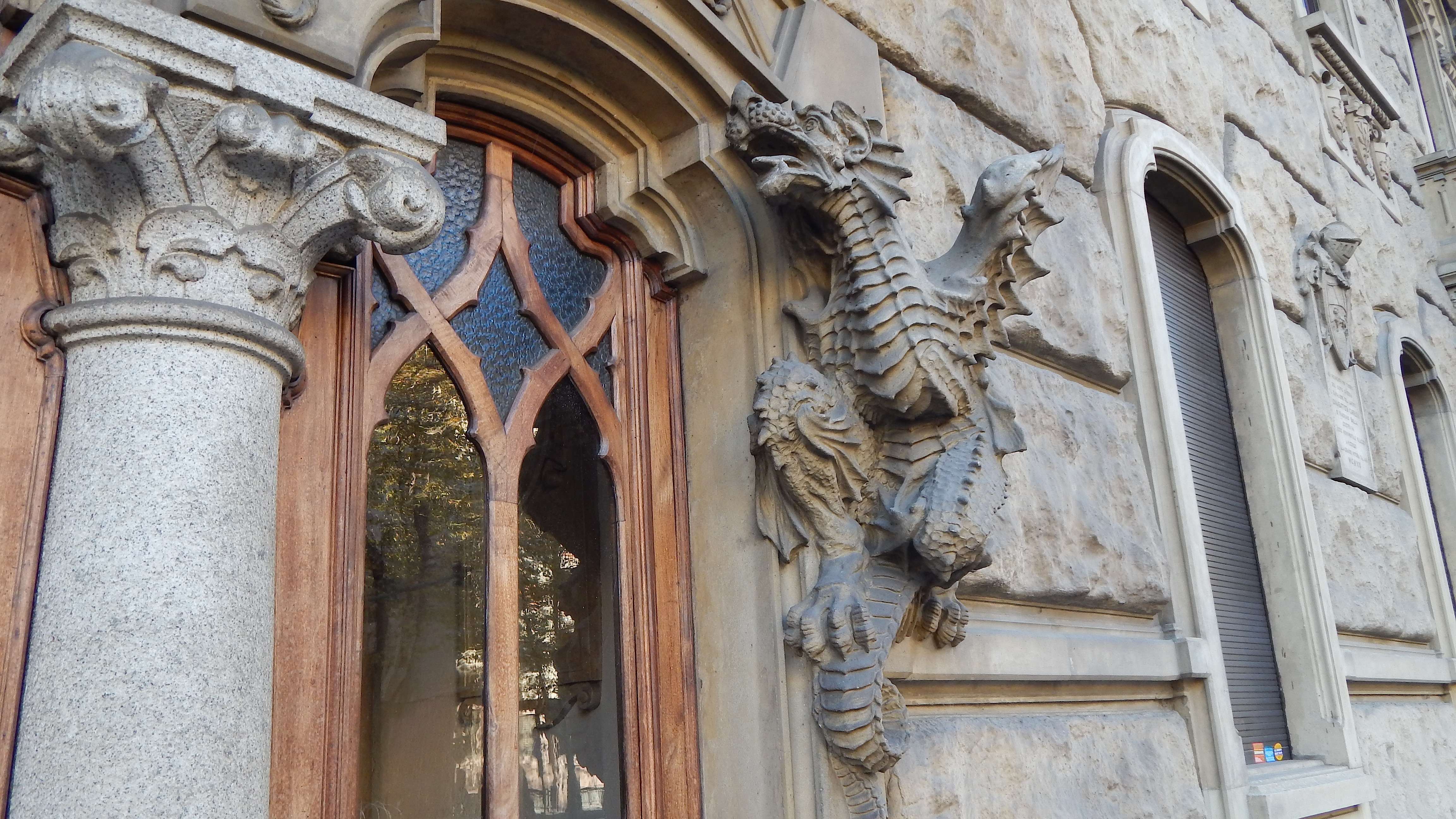 Una veduta della Casa della Vittoria (Torino)